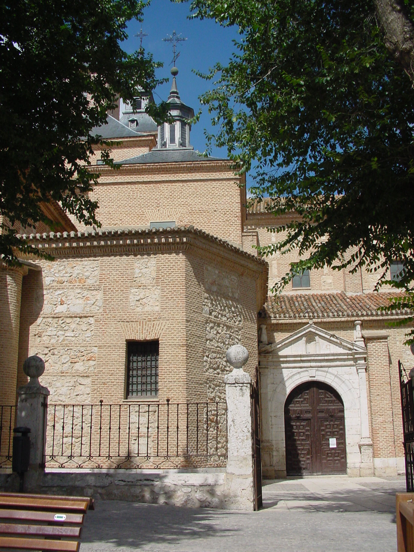 Iglesia en Arganda del Rey.